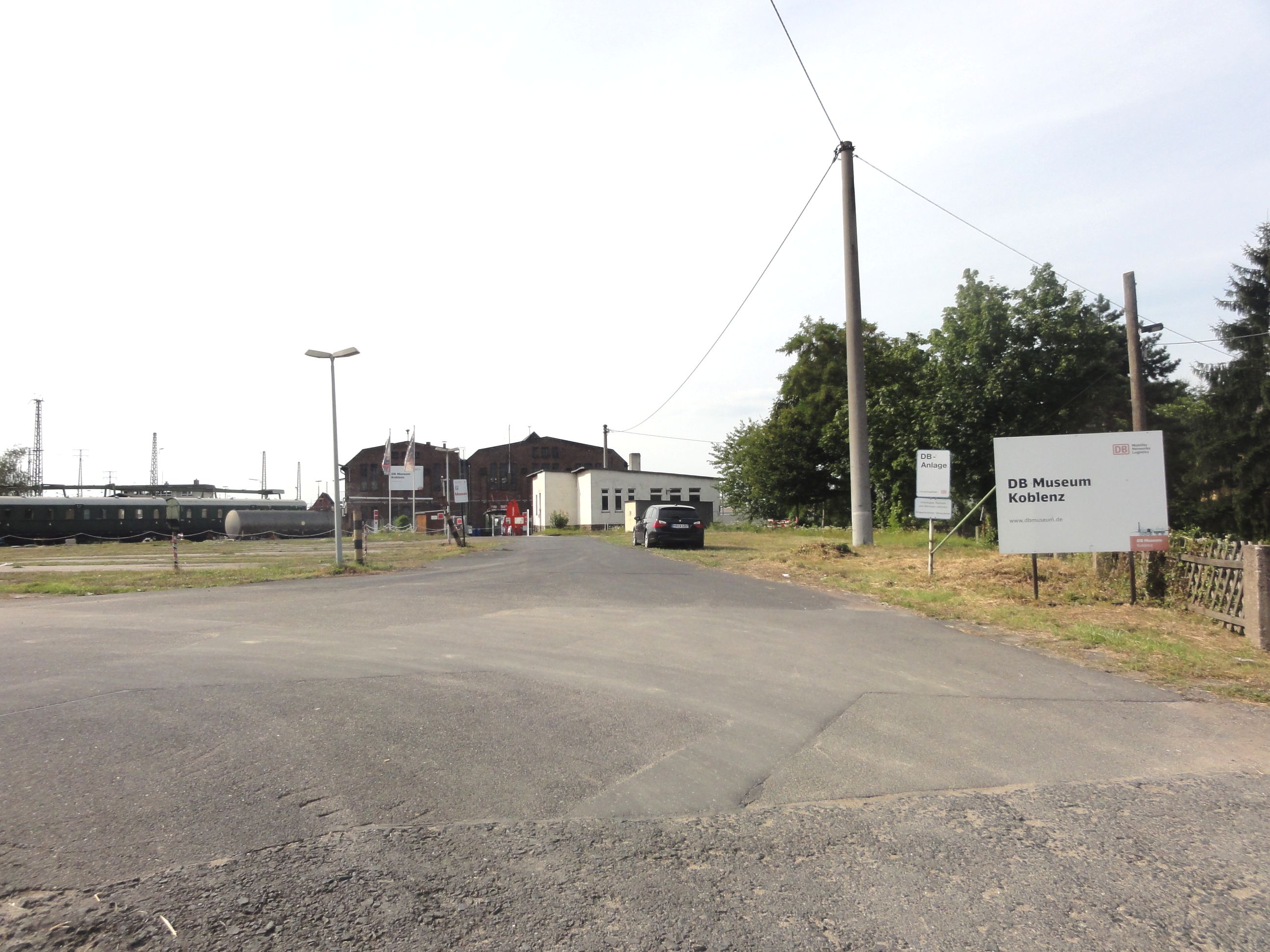 DB Museum Koblenz-Lützel